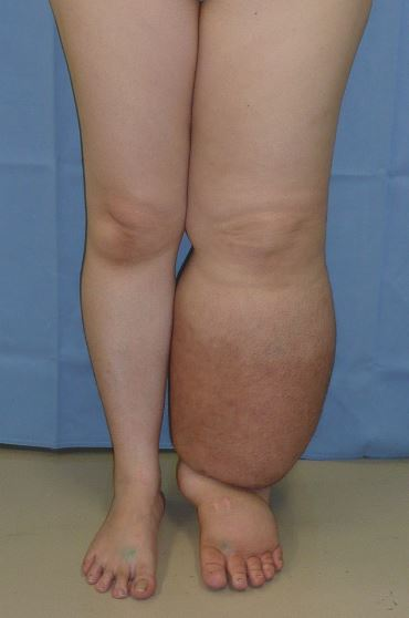 lymphedema limbs